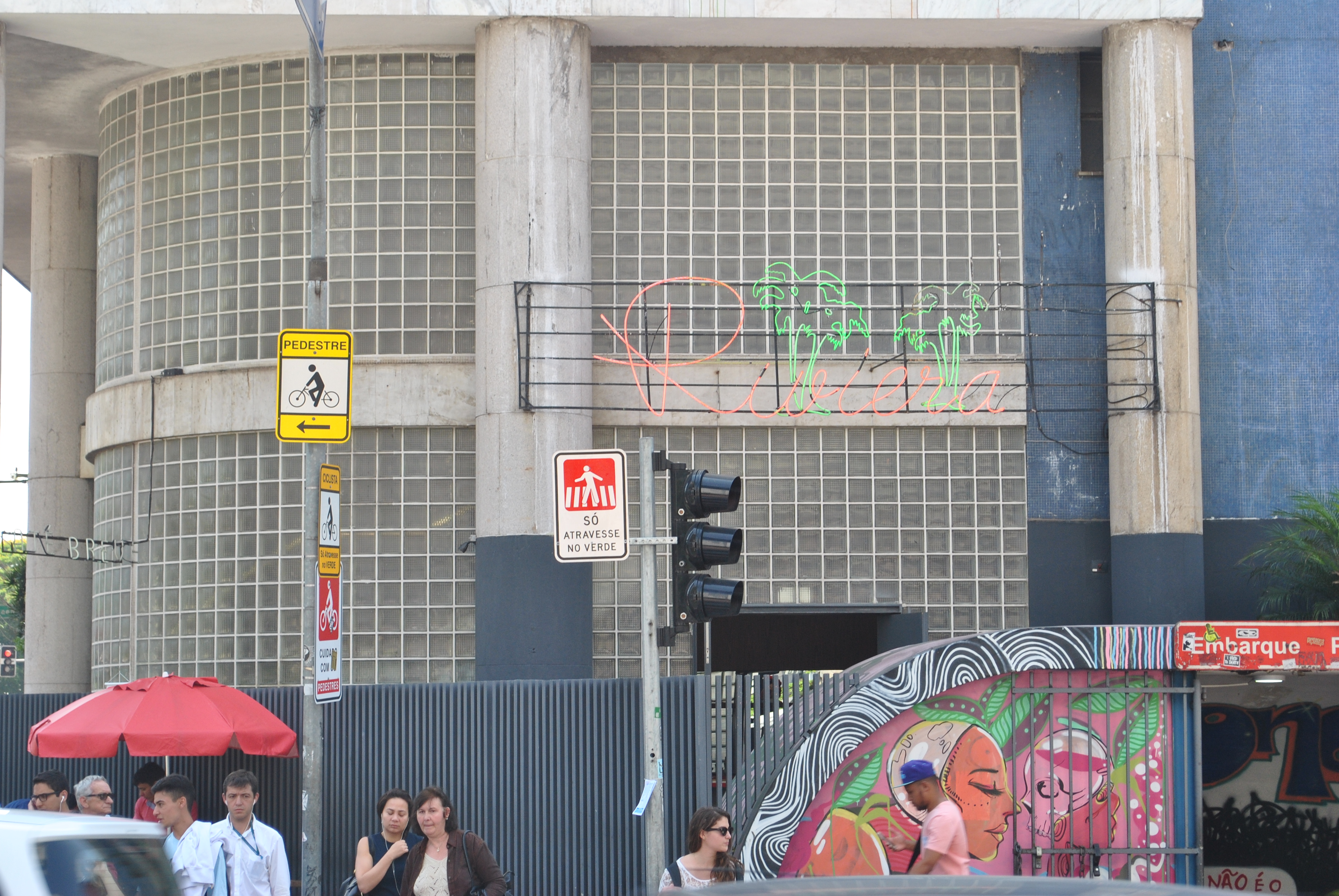 Lateral do Edifício Anchieta com face para a Rua da Consolação. Neste lado existe o restaurante Riviera Bar